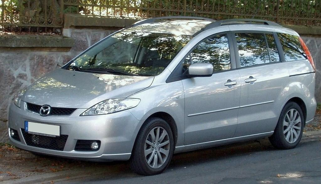 Mazda5